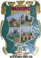 imagen GIF 141px × 200px 21.23 KB (21736 bytes)